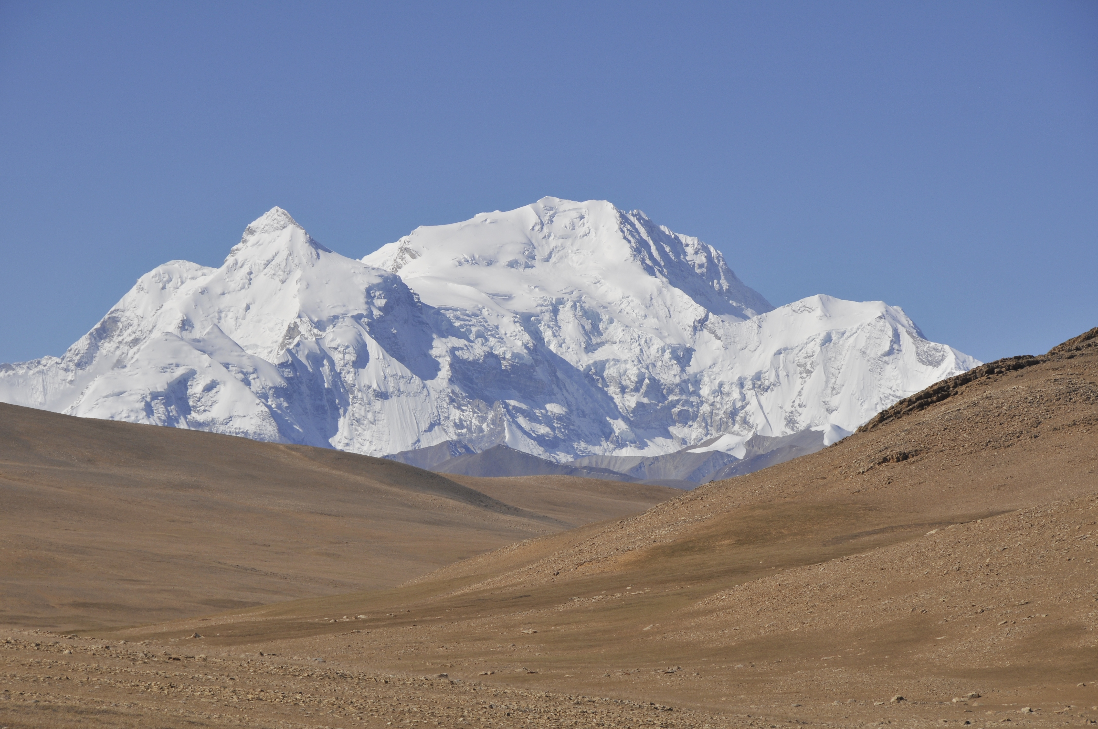 SHISHA PANGMA